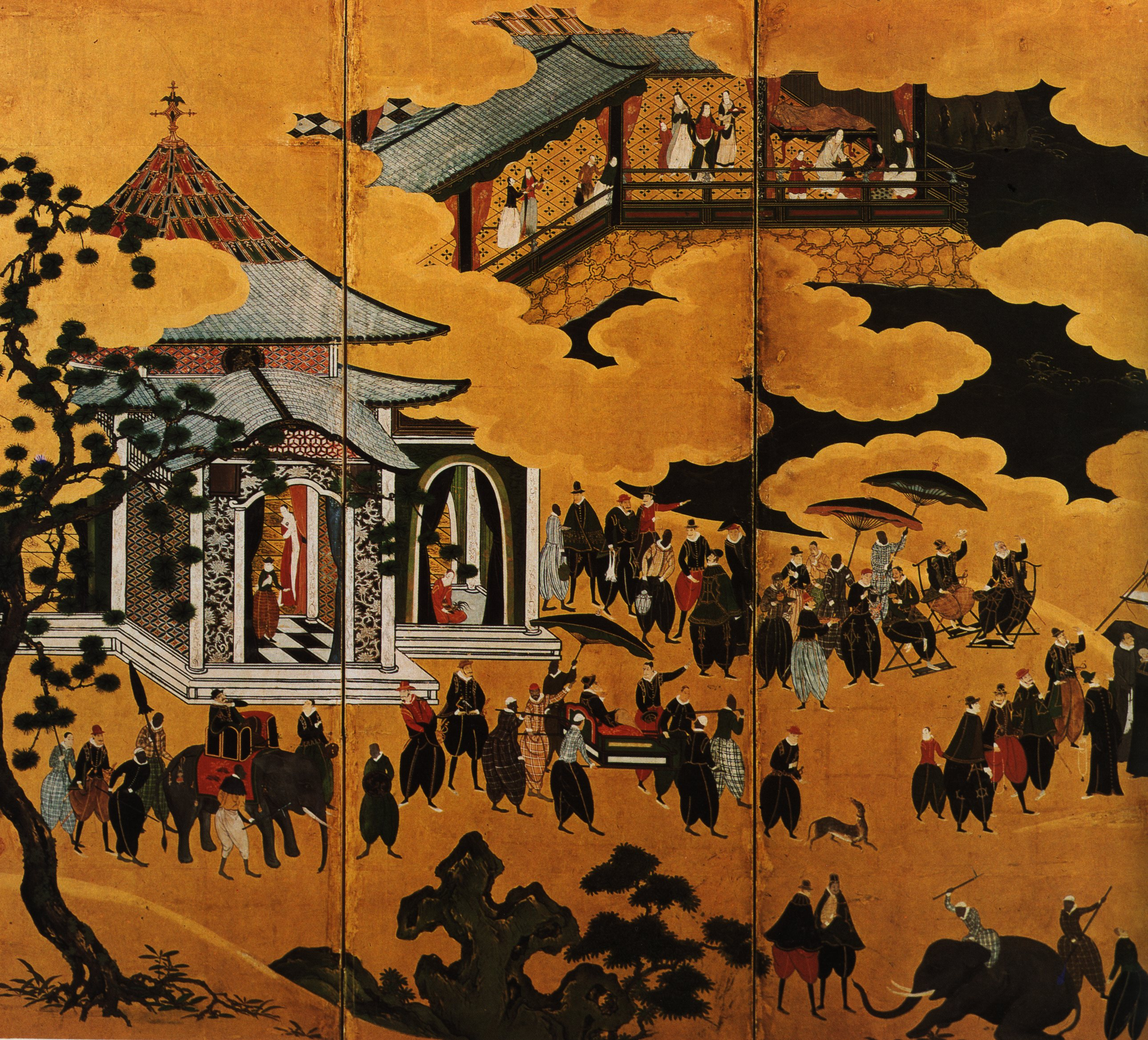 "Namban" art panels detail